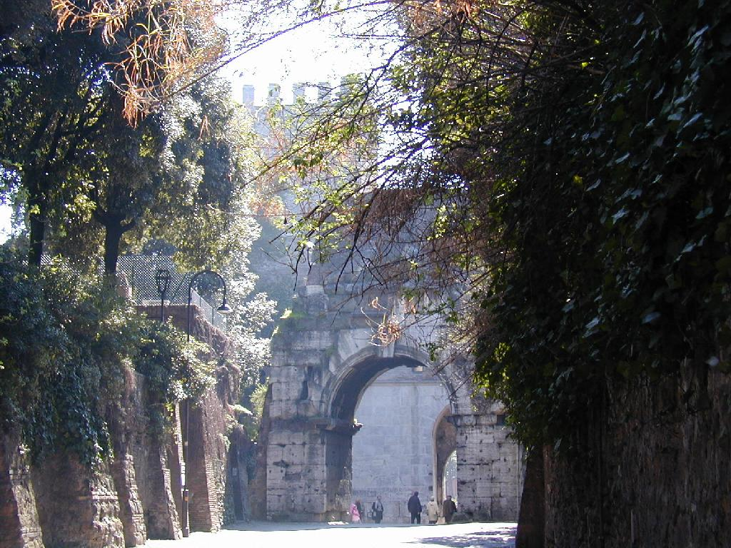 Roma, via Appia Antica: Arco di Druso e Porta San Sebastiano by Lalupa